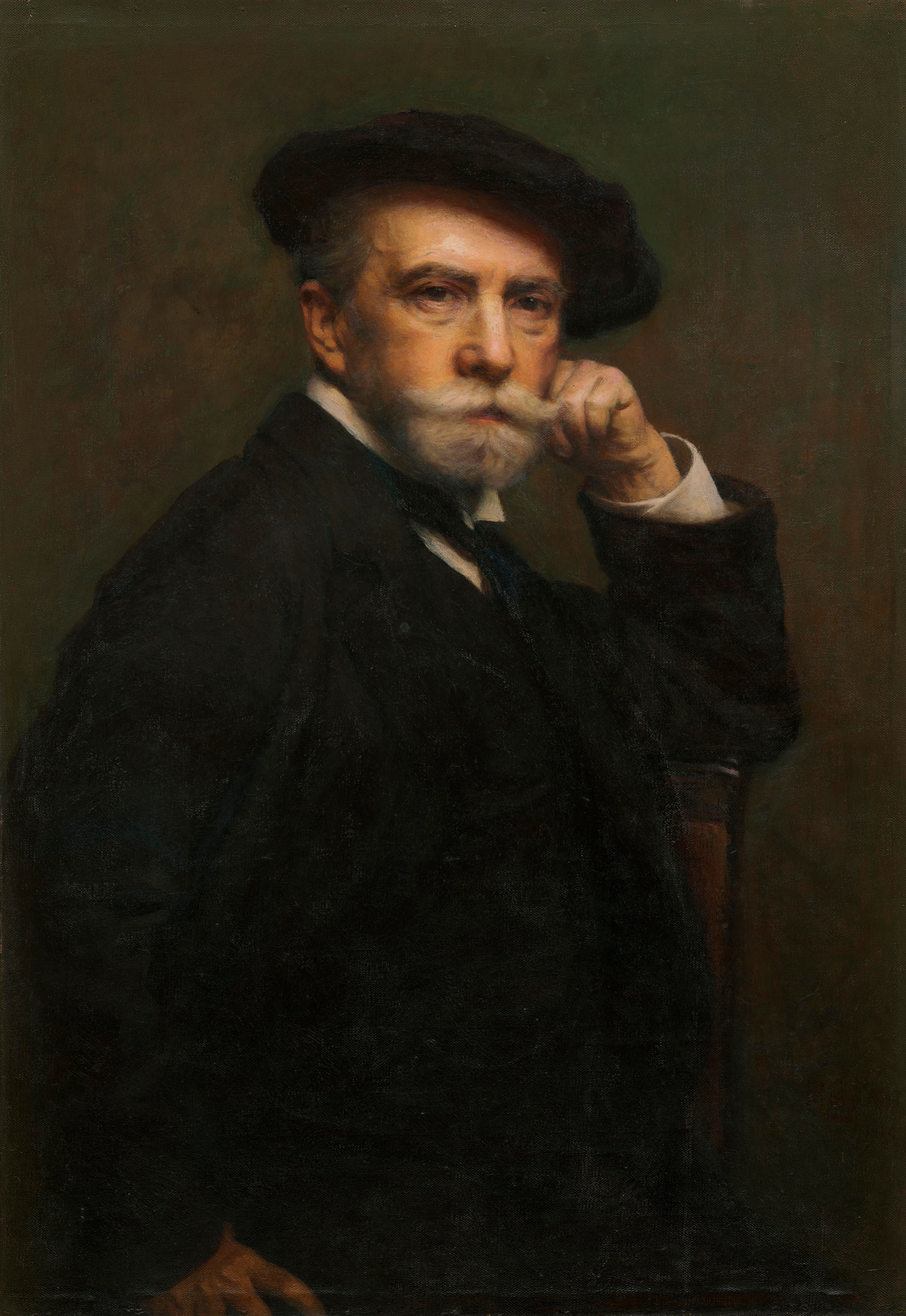 Autoportrét. (Východoslovenská galéria, Košice)